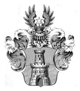 Wappen Familie Camuzi, Bayern